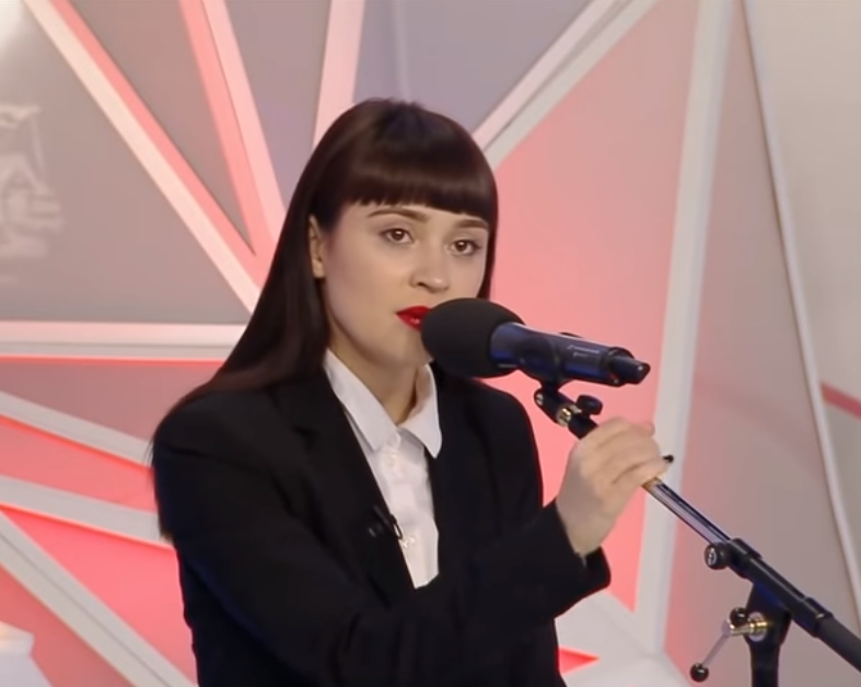 Secvență a unei vizite a Irinei Rimes în emisiunea Vorbe Bune cu Lilu